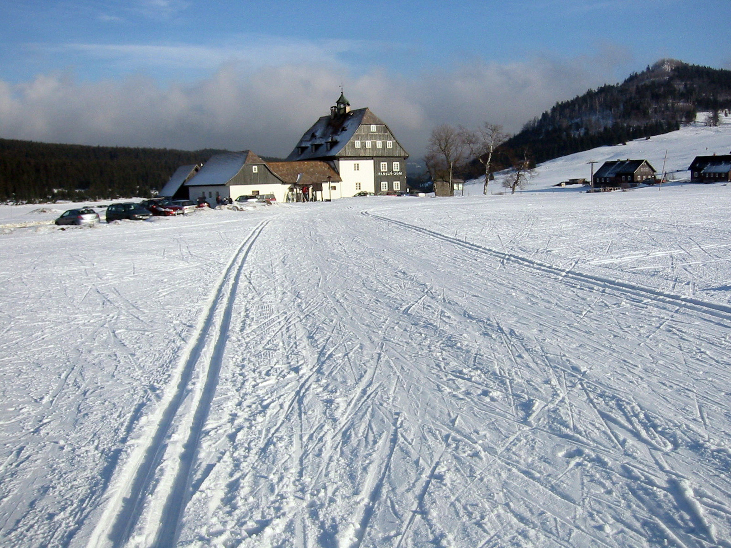 Klein Iser, Herrenhaus mit Buchberg